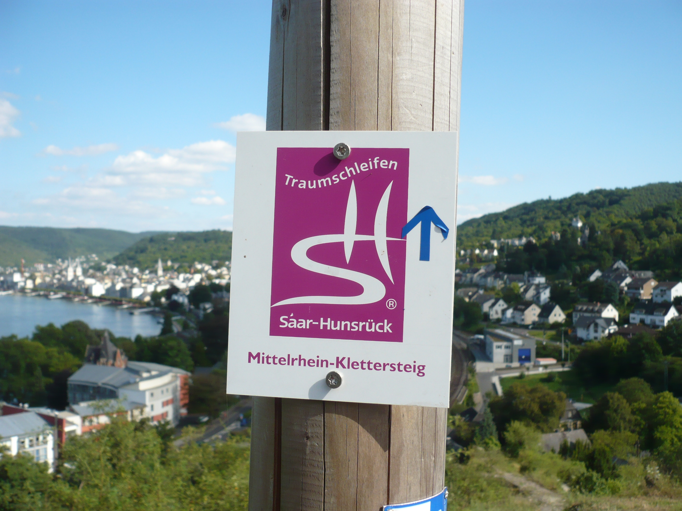 Symbol und Wegmarke Mittelrhein Klettersteig Boppard